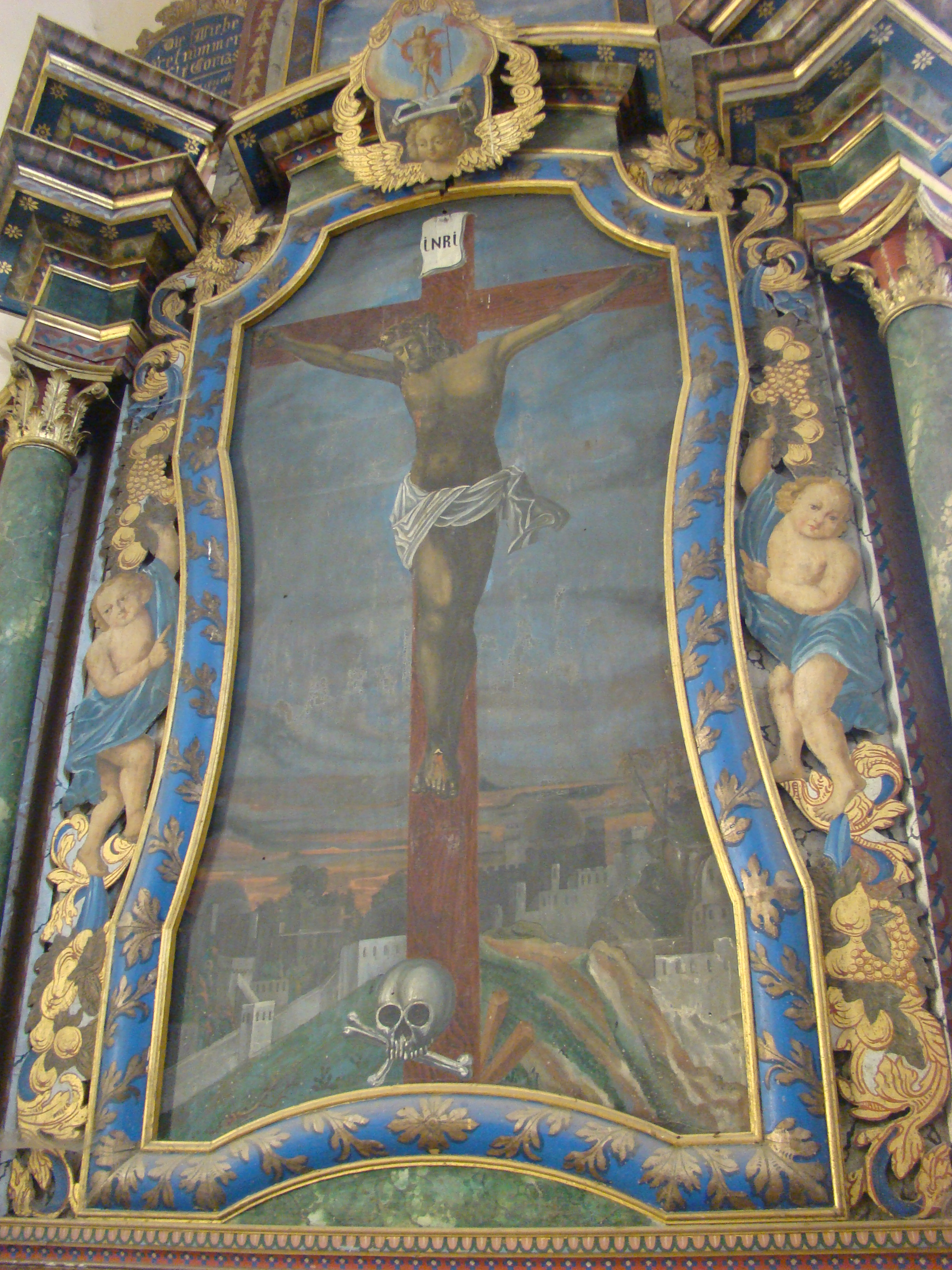 Biserica evanghelică fortificată din Nou, județul Sibiu